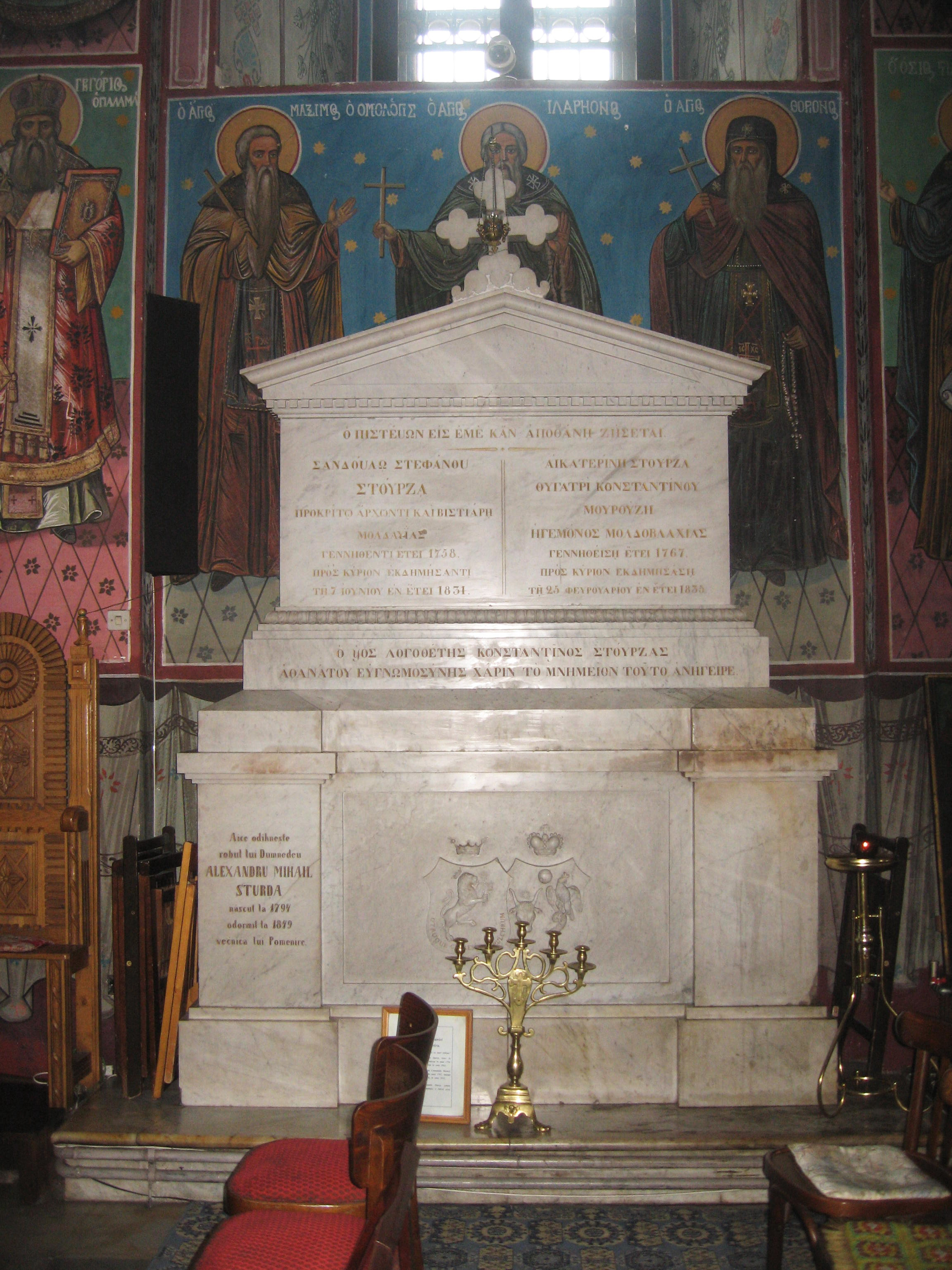 Biserica Bărboi din Iași